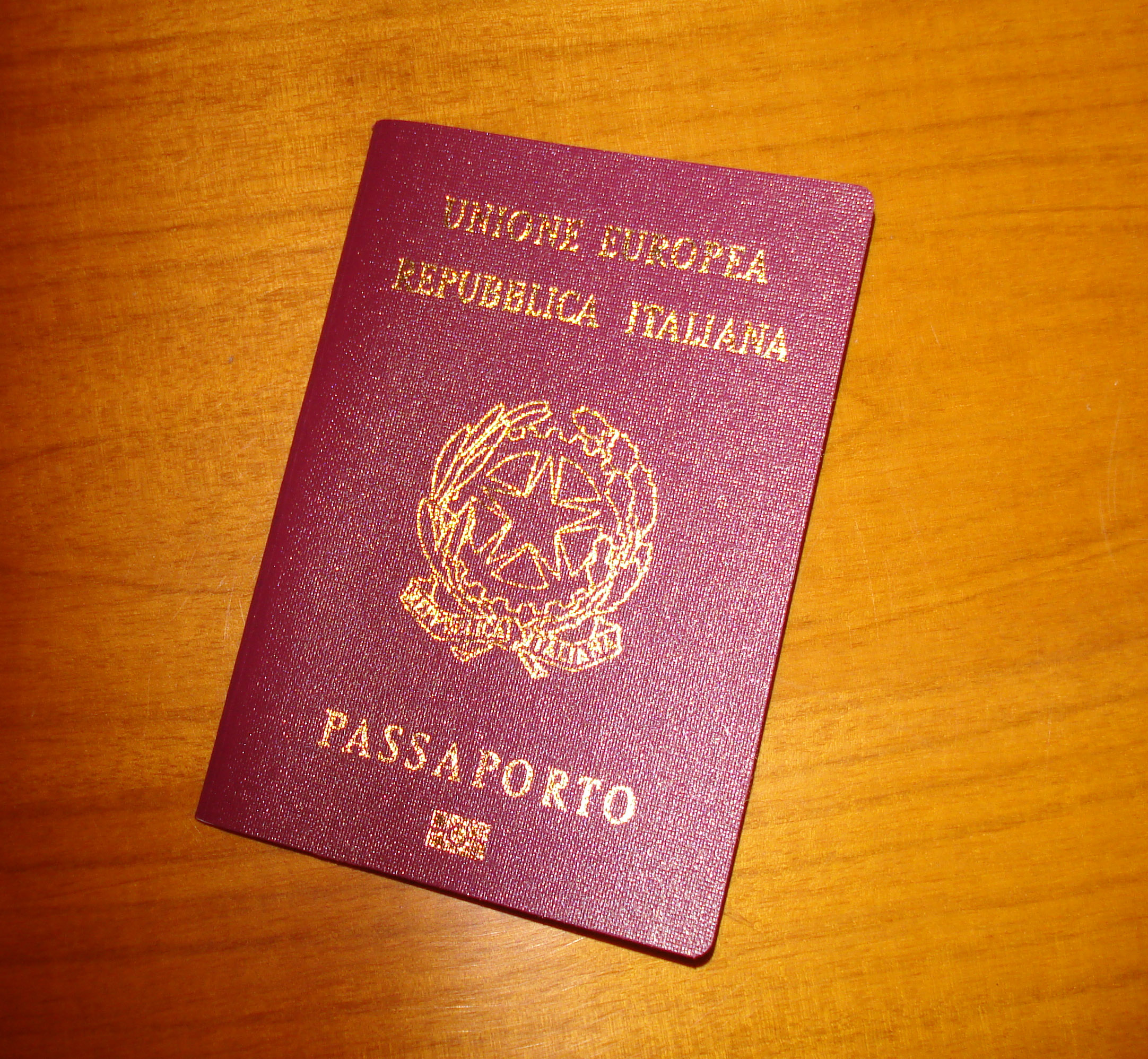 گذرنامه اروپایی٬ دارای اثرانگشت دیجیتال ثبت‌شده در جلد پاسپورت.